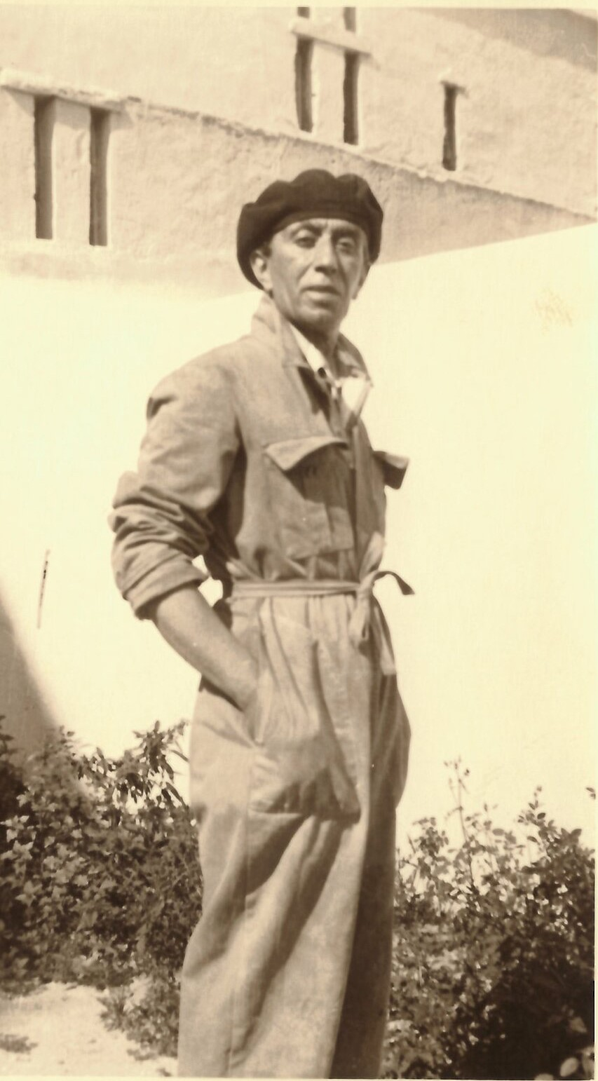 Delfim Maya em traje de trabalho. Fotografia cedida por Maria José Maya